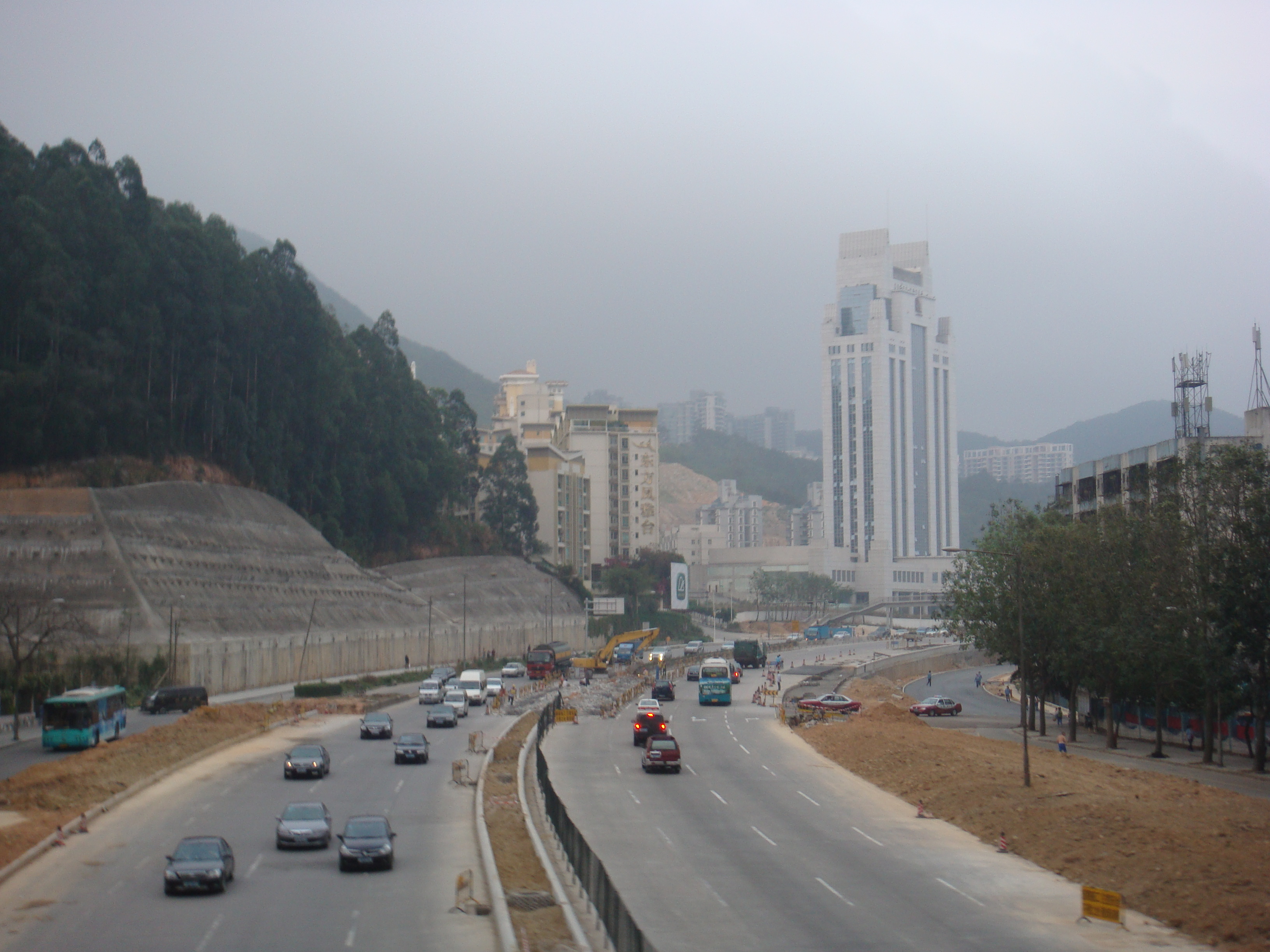 羅沙公路